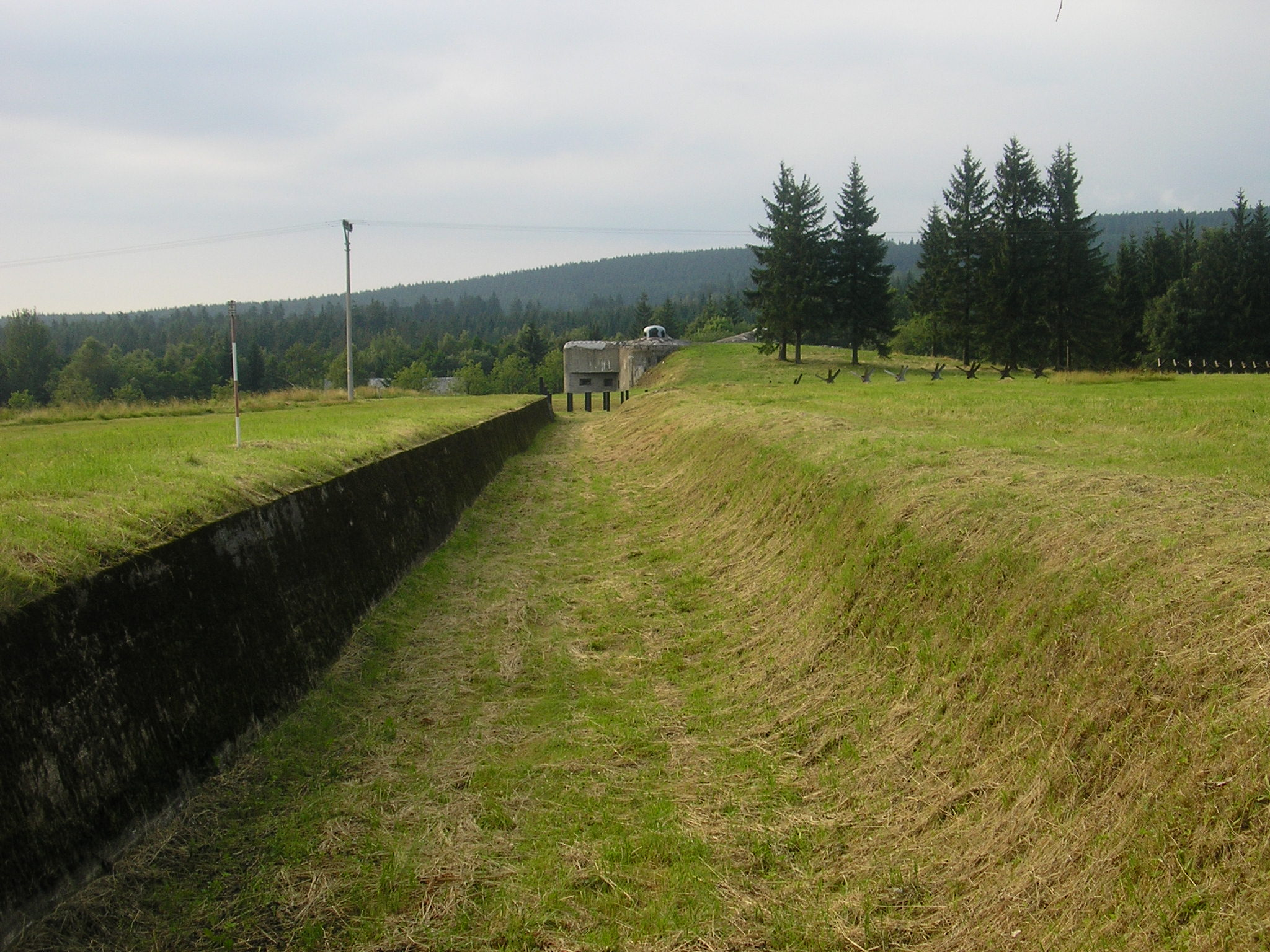 R-S 74 Na Holém v Orlických horách